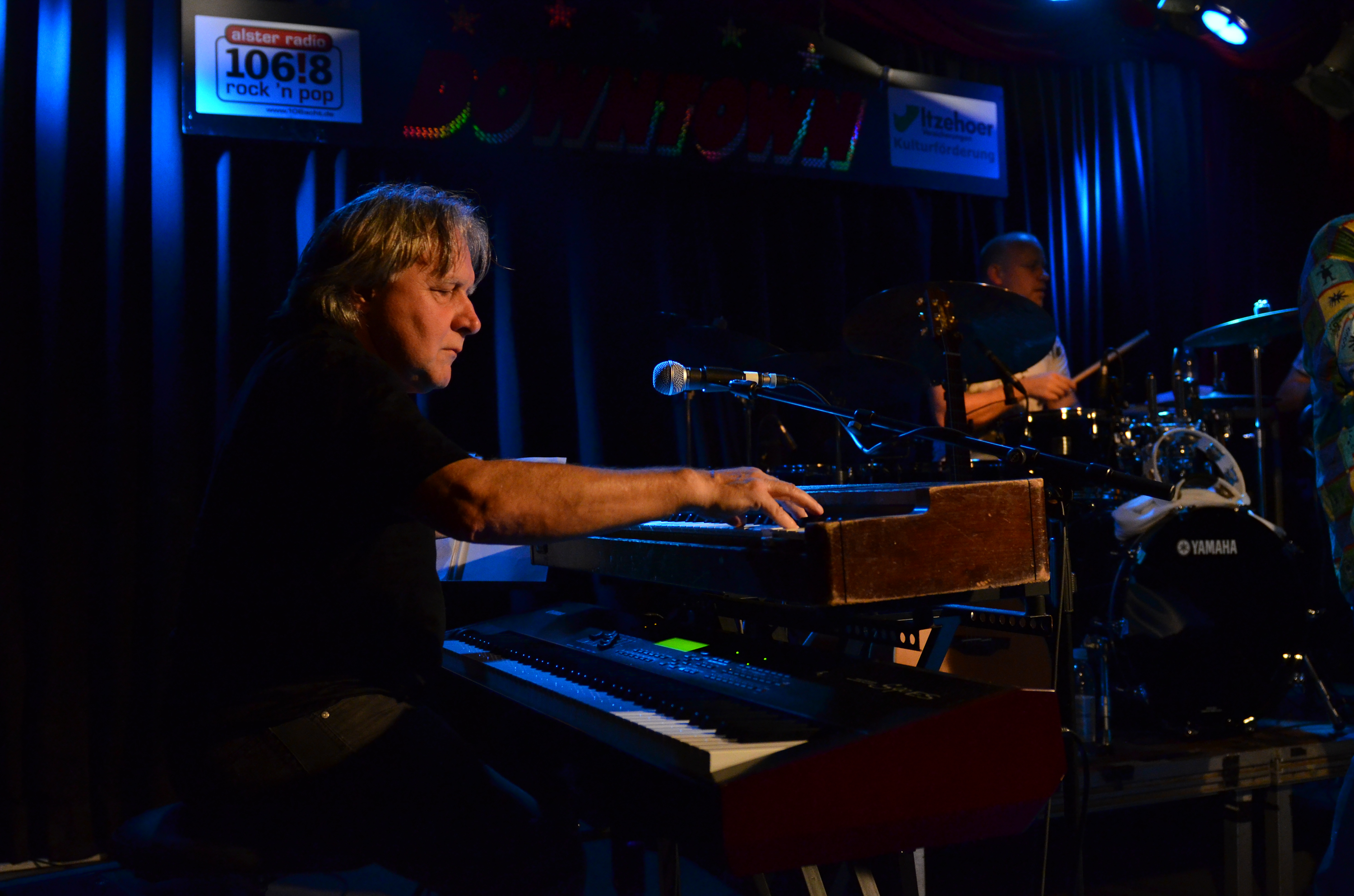 Musiker und Radio- und TV-Moderator Peter Urban (keyboards) mit dem The Paul Botter's Soul & Blues Project live im Downtown Bluesclub Hamburg 2011, Deutschland